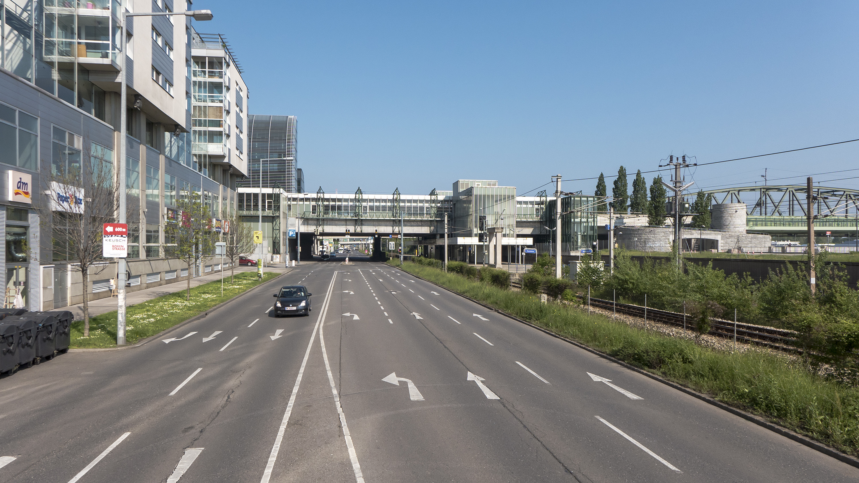 Handelskai in Wien 20 bei Nr. 96 Richtung Nordwesten